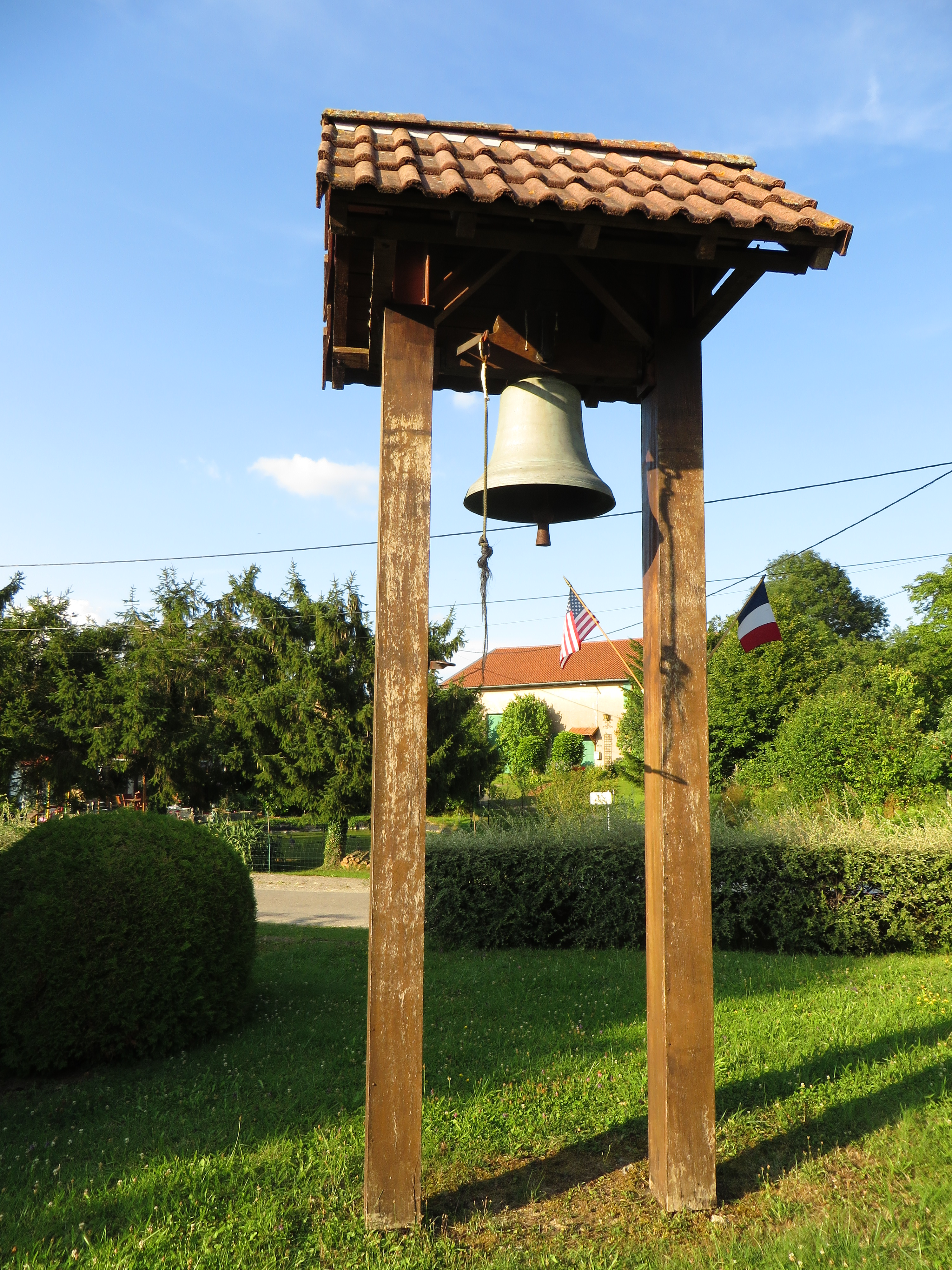 Épinonville Chapelle Saint-Nicolas d'Ivoiry le clocher